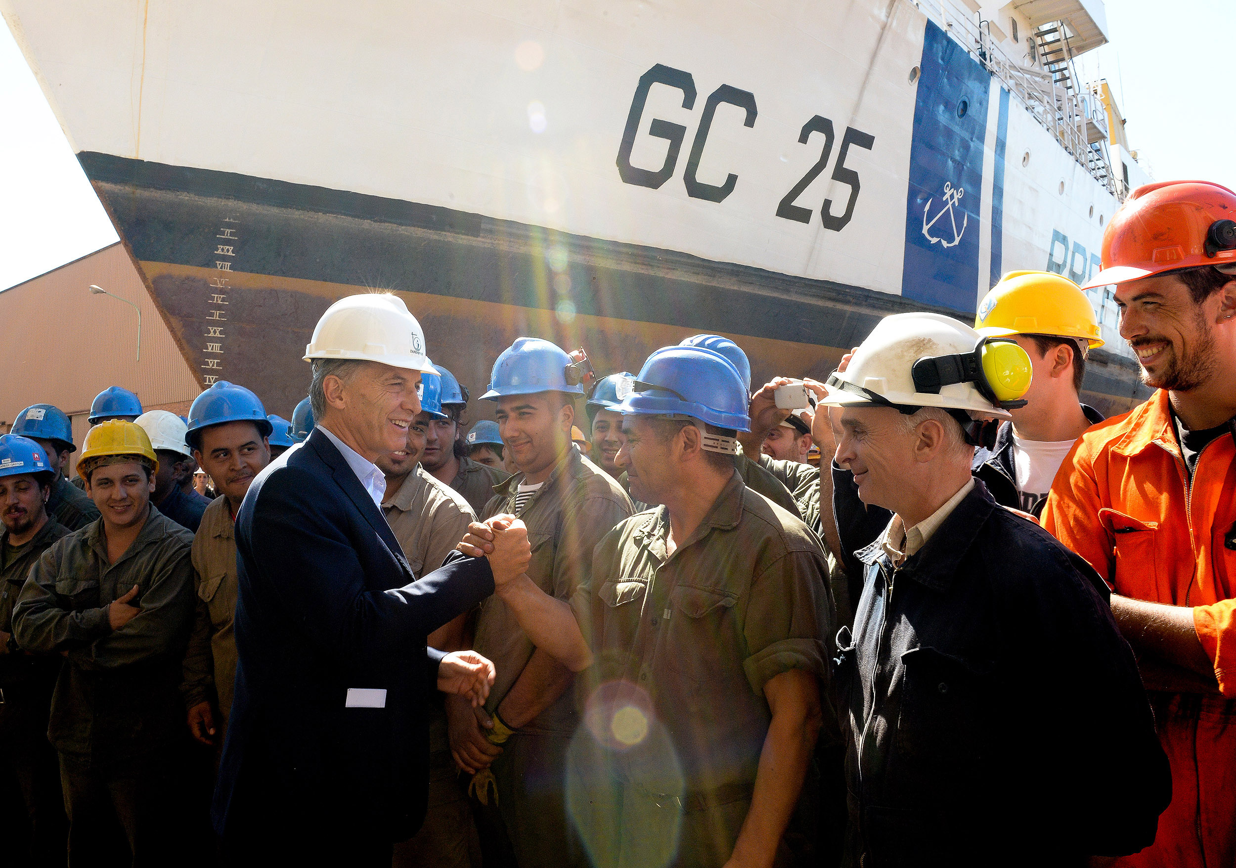 El presidente Mauricio Macri recorrió esta mañana el astilero Tandanor en el puerto de Buenos Aires, donde continúan desarrollándose los trabajos de reparación y puesta a punto del rompehielos ARA Almirante Irizar después del incendio que lo afectó en 2007.